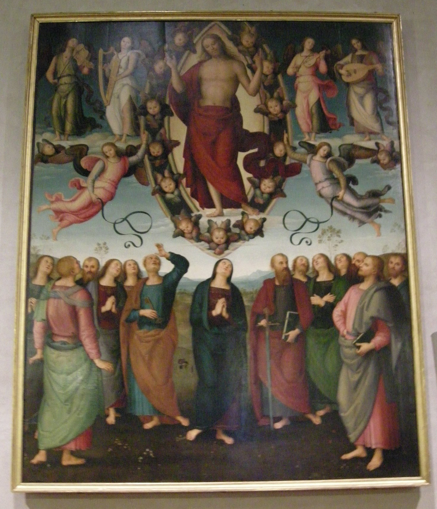 Duomo di sansepolcro, interno, perugino, ascensione